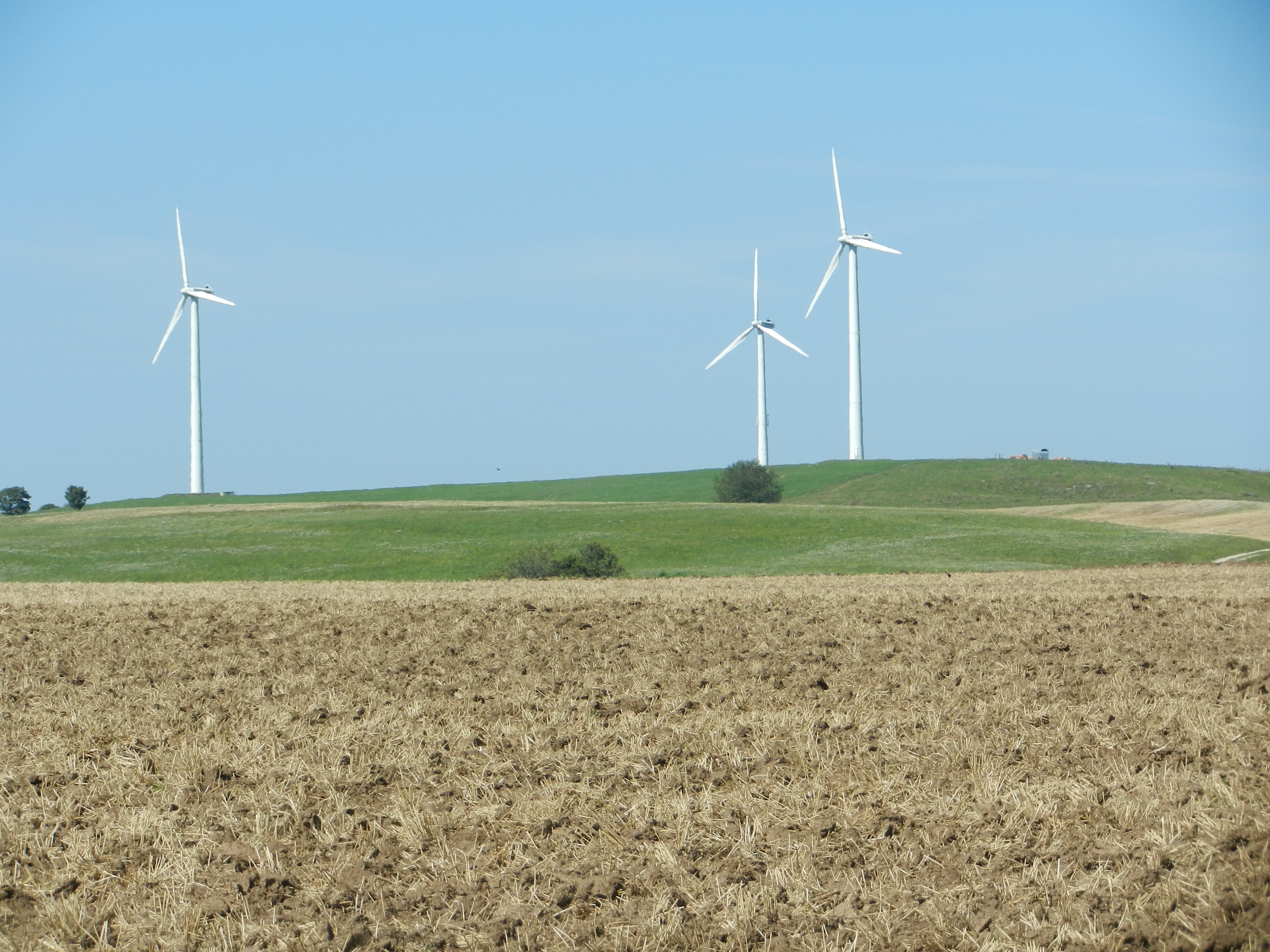 Windpark Himmelberg bei Burladingen